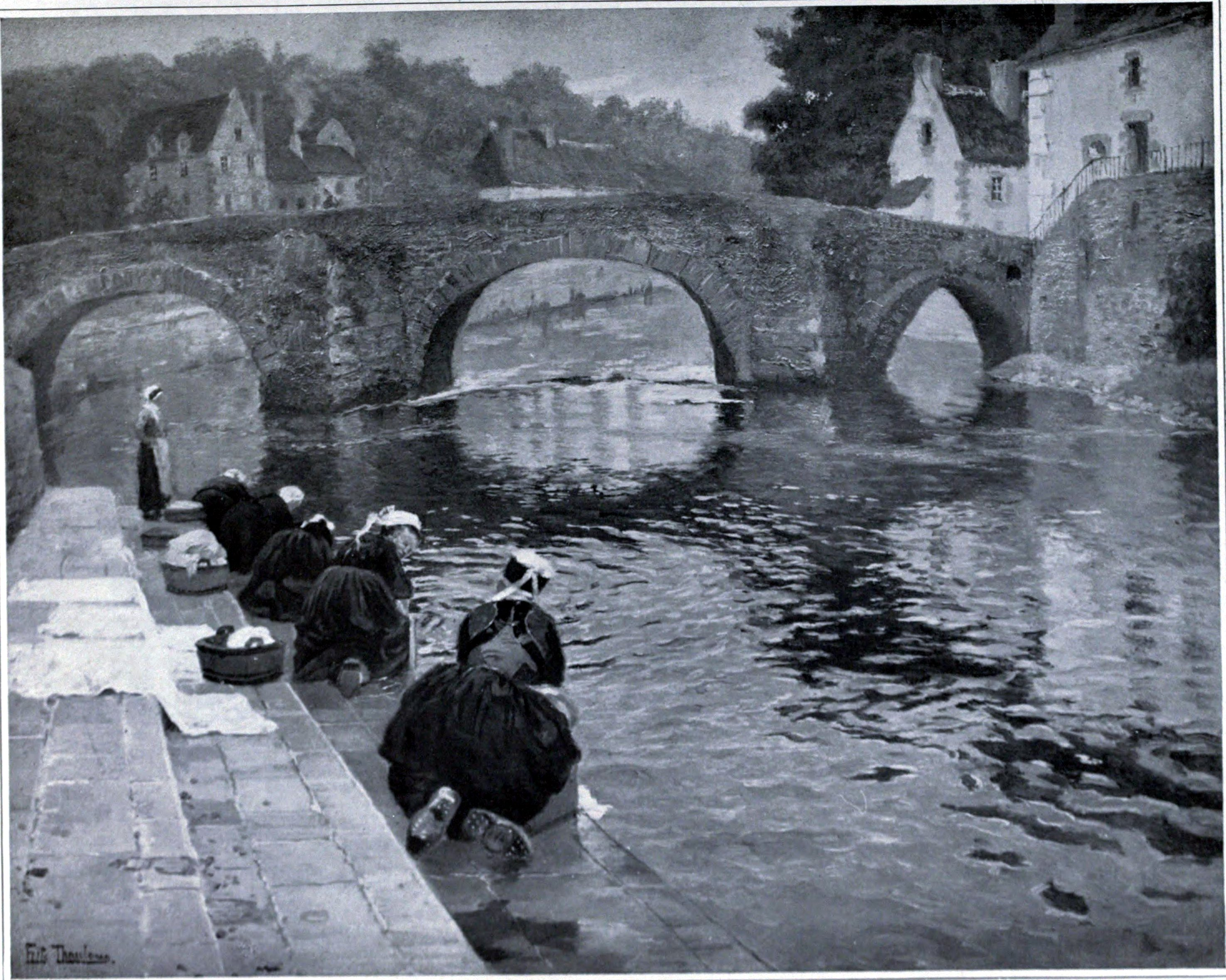 Le pont est sans doute le « Pont Fleuri » sur la rivière Ellé.